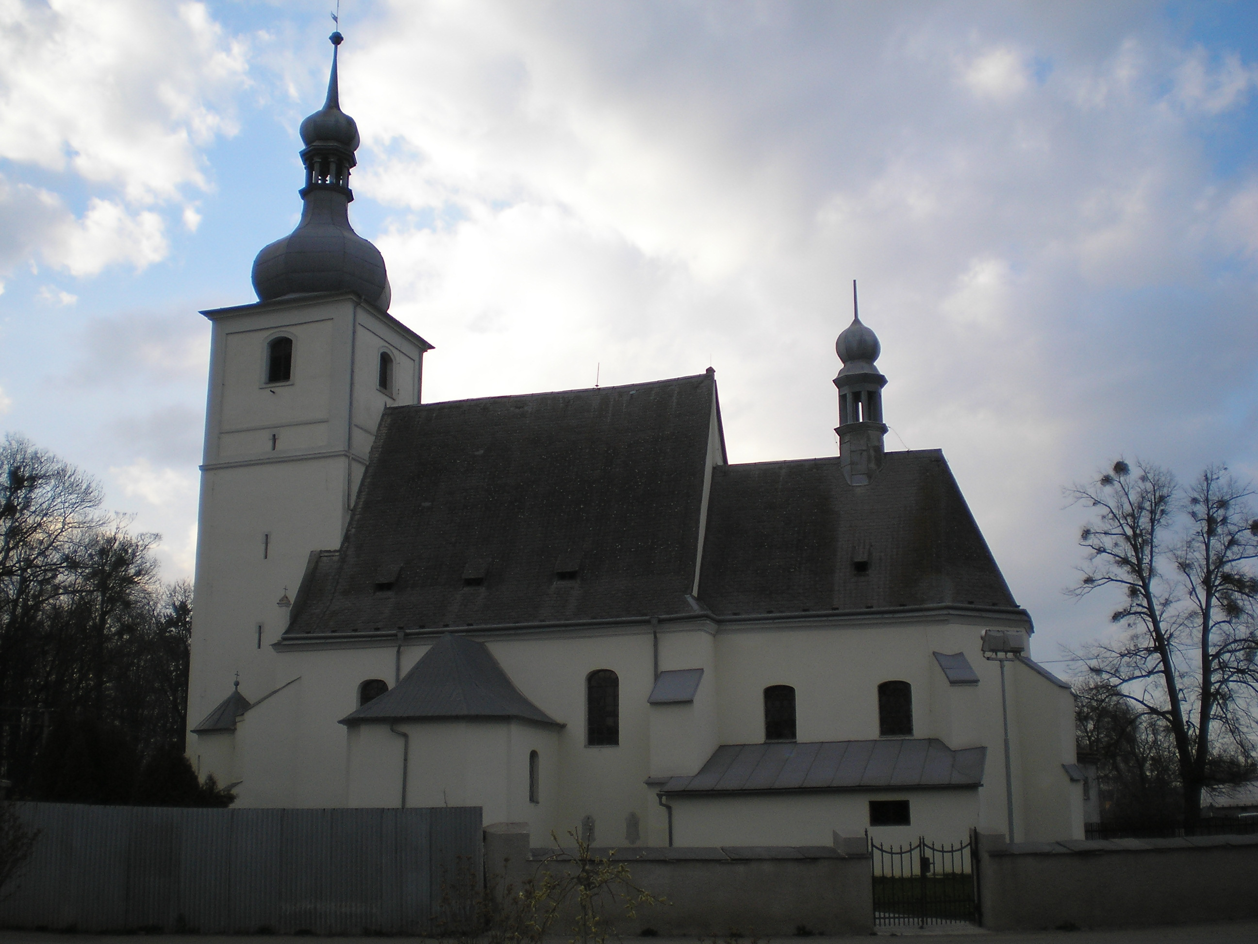 Pohled od obecního úřadu na kostel sv. Valentina v Bravanticích.